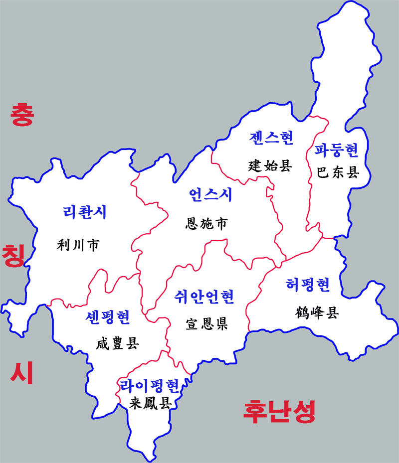 언스투자족 마오족자치주 현급구역도